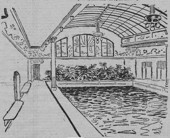 Sveabadet, interiör